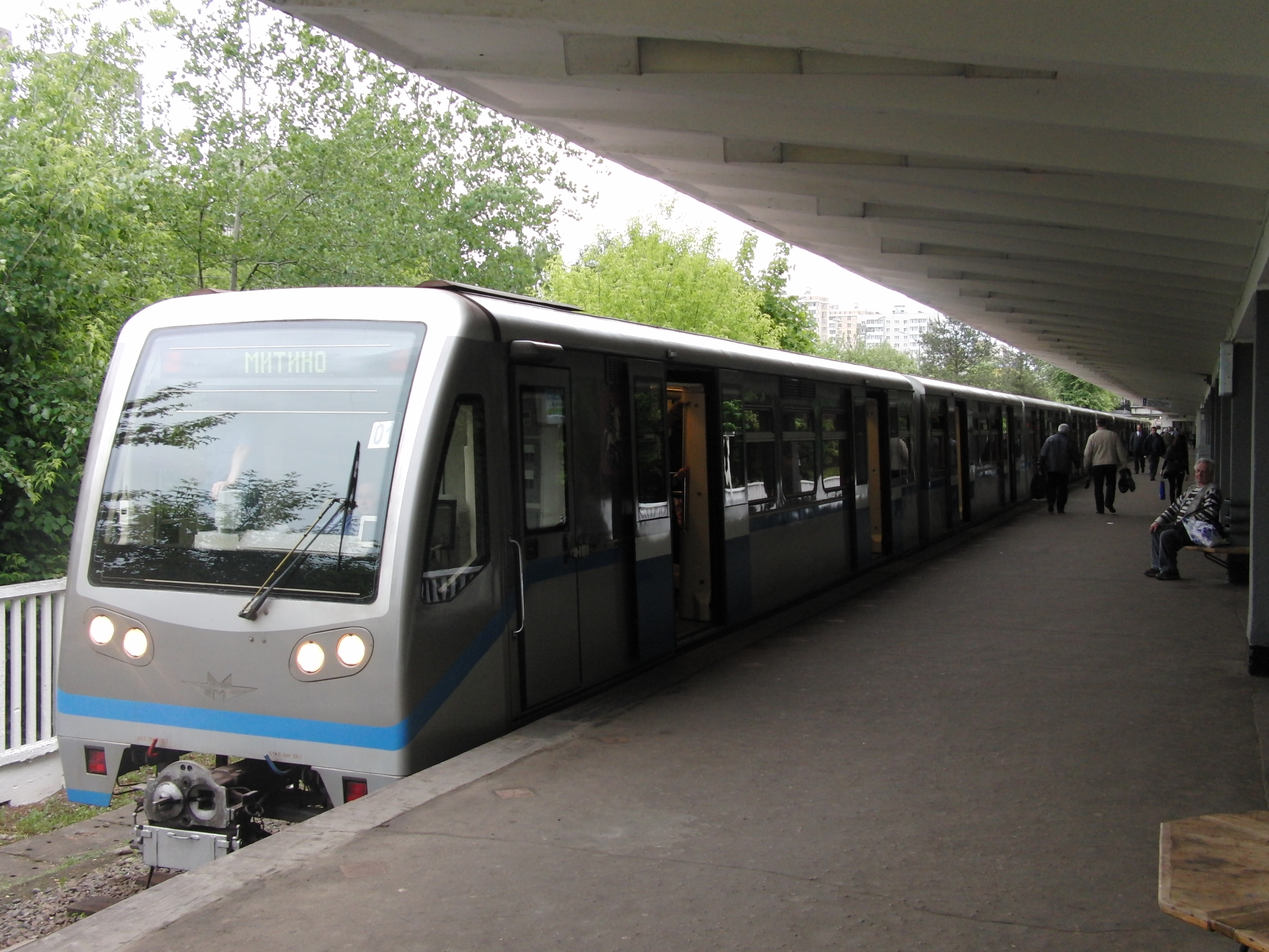 Станция «Измайловская».